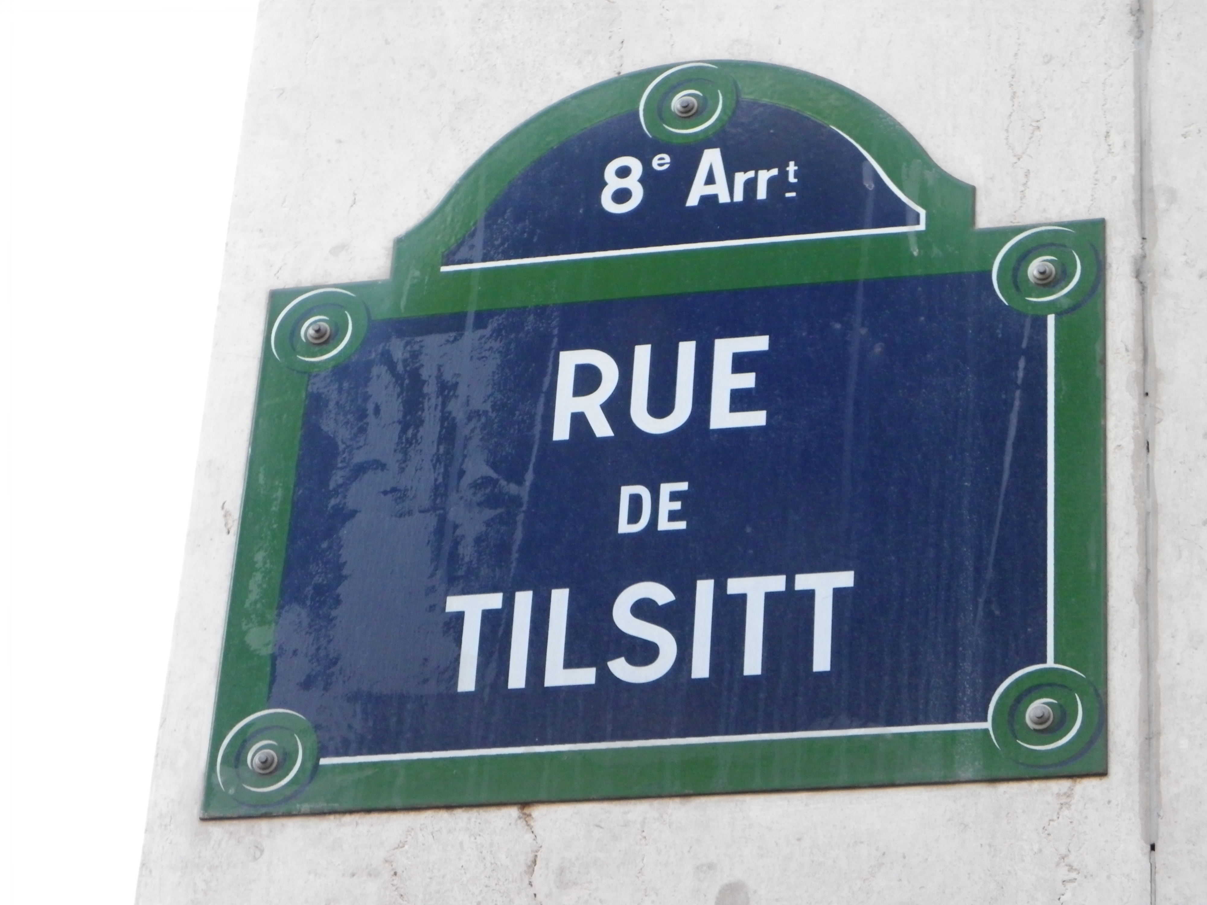 Plaque de la rue de Tilsitt à Paris